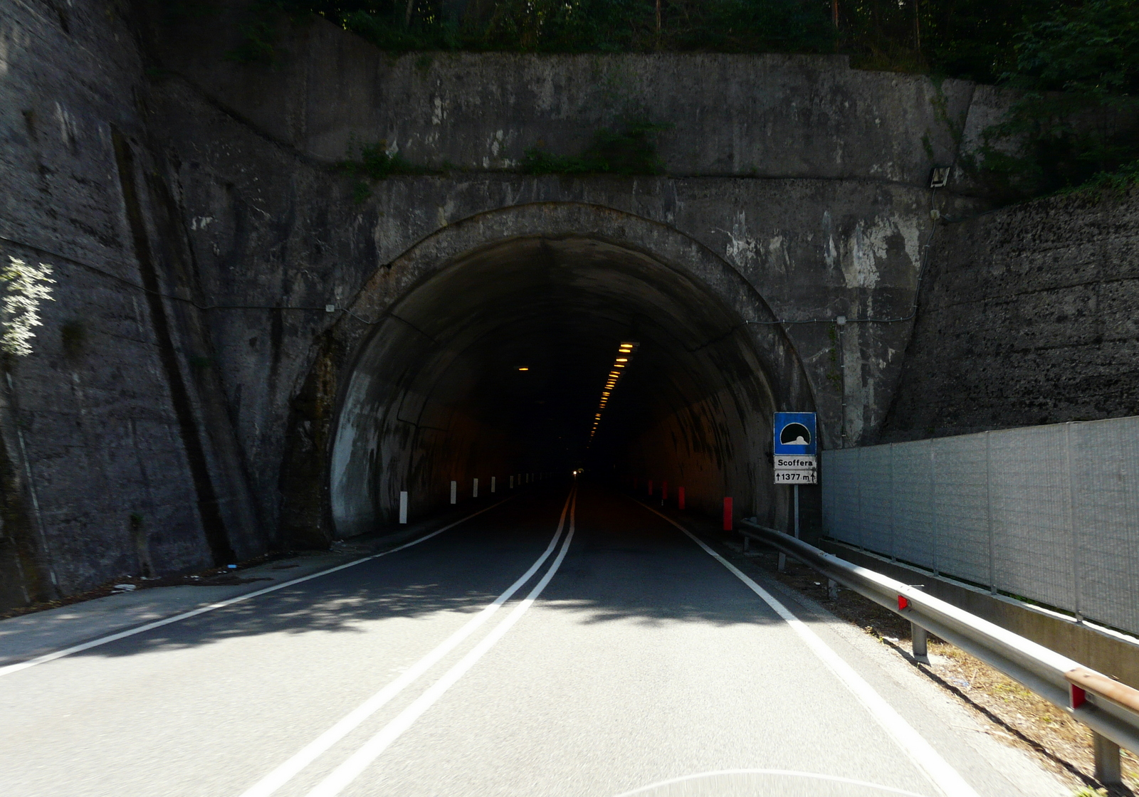 La galleria Scoffera presso il Passo dello Scoffera lungo la strada statale 45, Davagna, Liguria, Italia